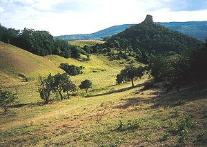 Cerová vrchovina (Slovakia)